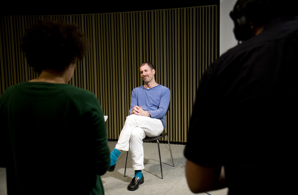 2012 Foto: Gemma Planell / MACBA